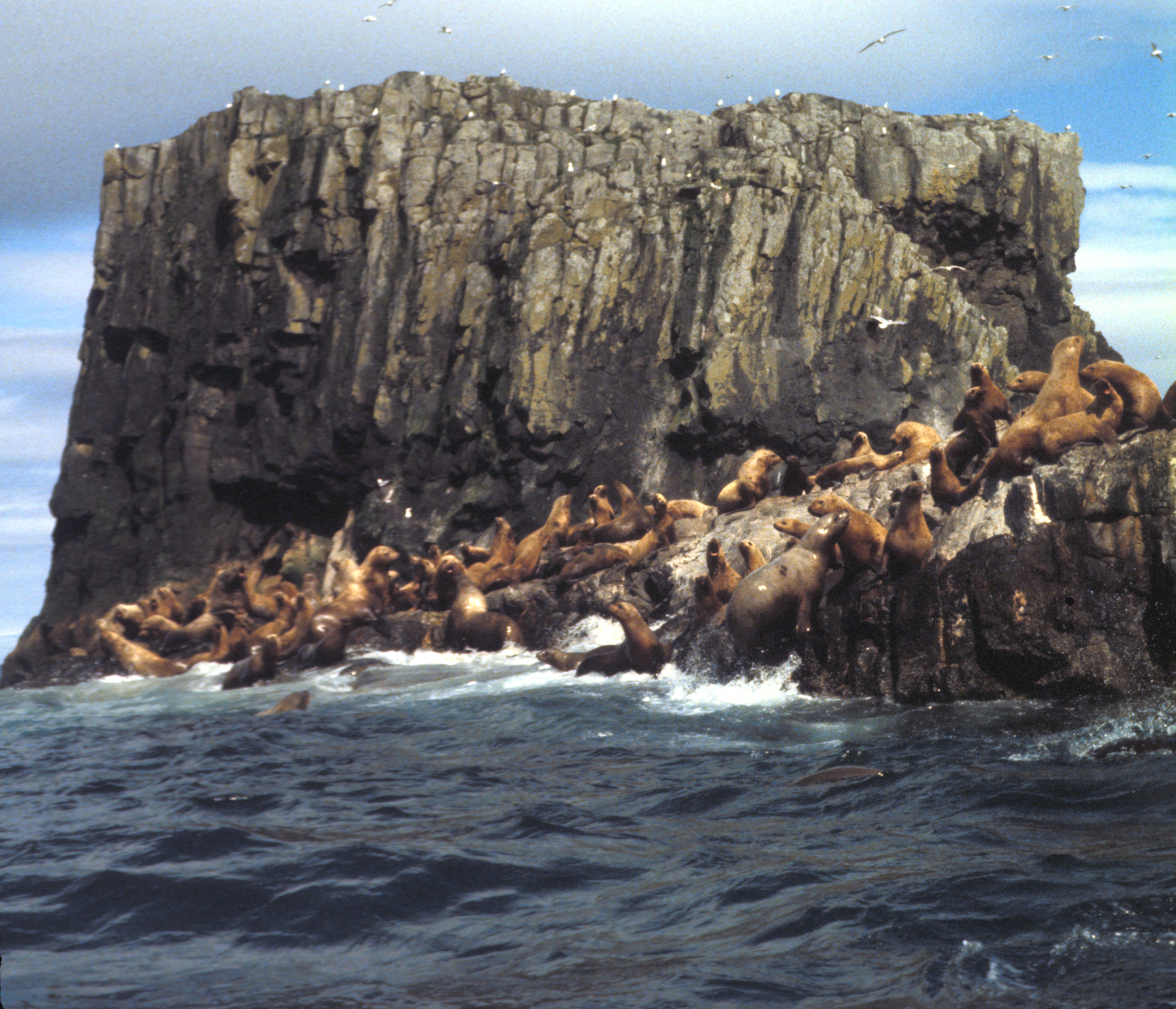 Aiugunak Pinnacles, Steller Sea lions